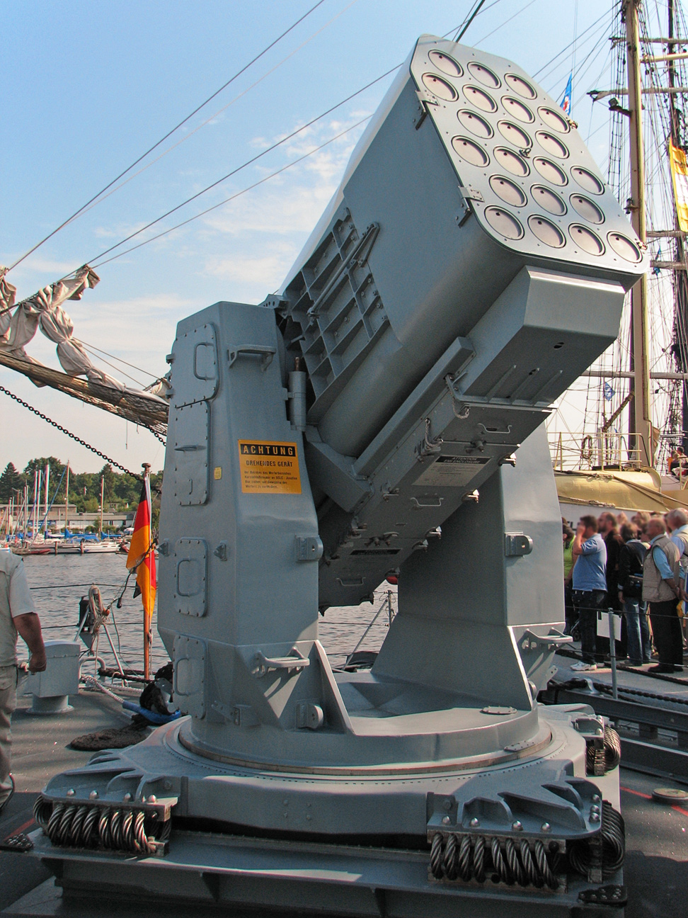 Dieses Bild zeigt einen RIM-116 Rolling Airframe Missile (RAM) Launcher auf dem Schnellboot S78 Ozelot der Deutschen Marine.